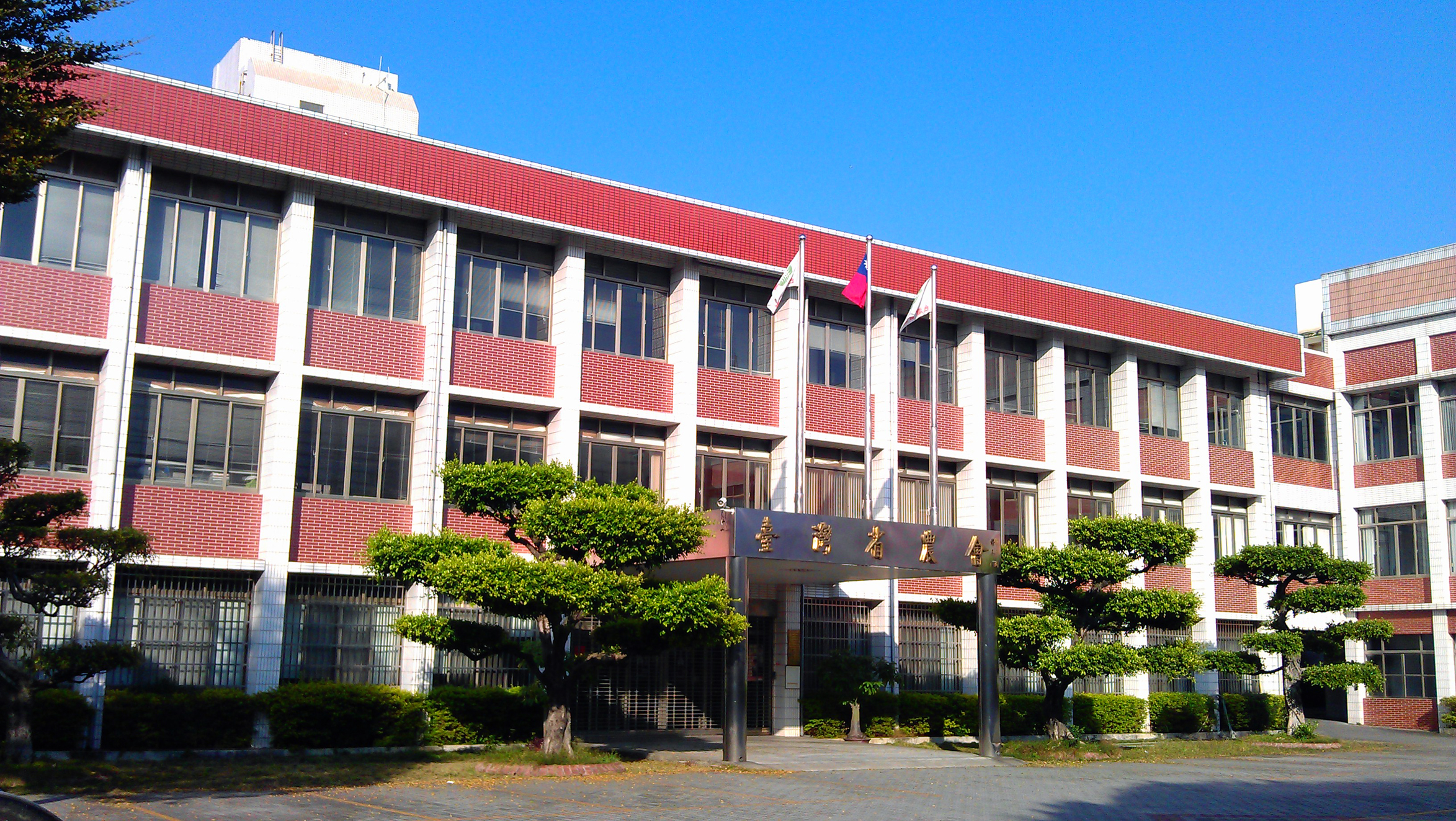 中文（台灣）: 台灣省農會，位於臺灣臺中市大里區中興路二段522號。